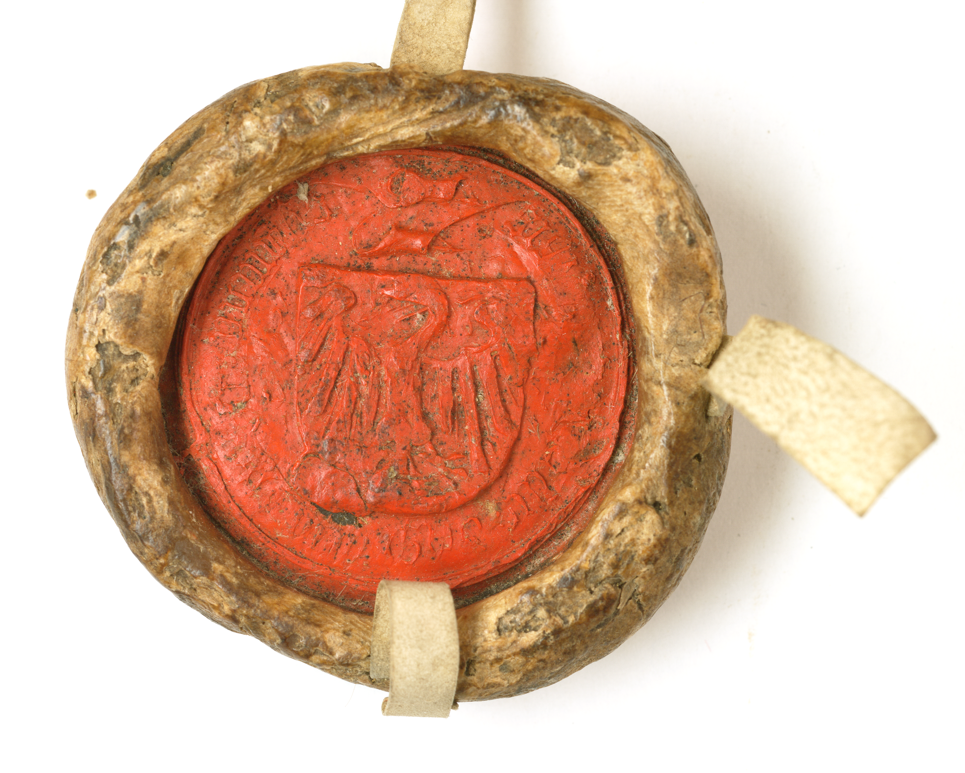 Pieczęć Jana IV (Janusza), księcia oświęcimskiego